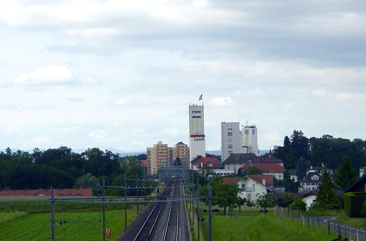 Düdingen, Getreidesilos